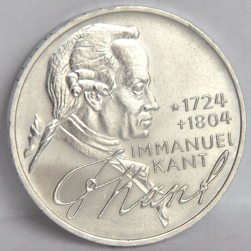 5-DM-Gedenkmünze Immanuel Kant; Avers